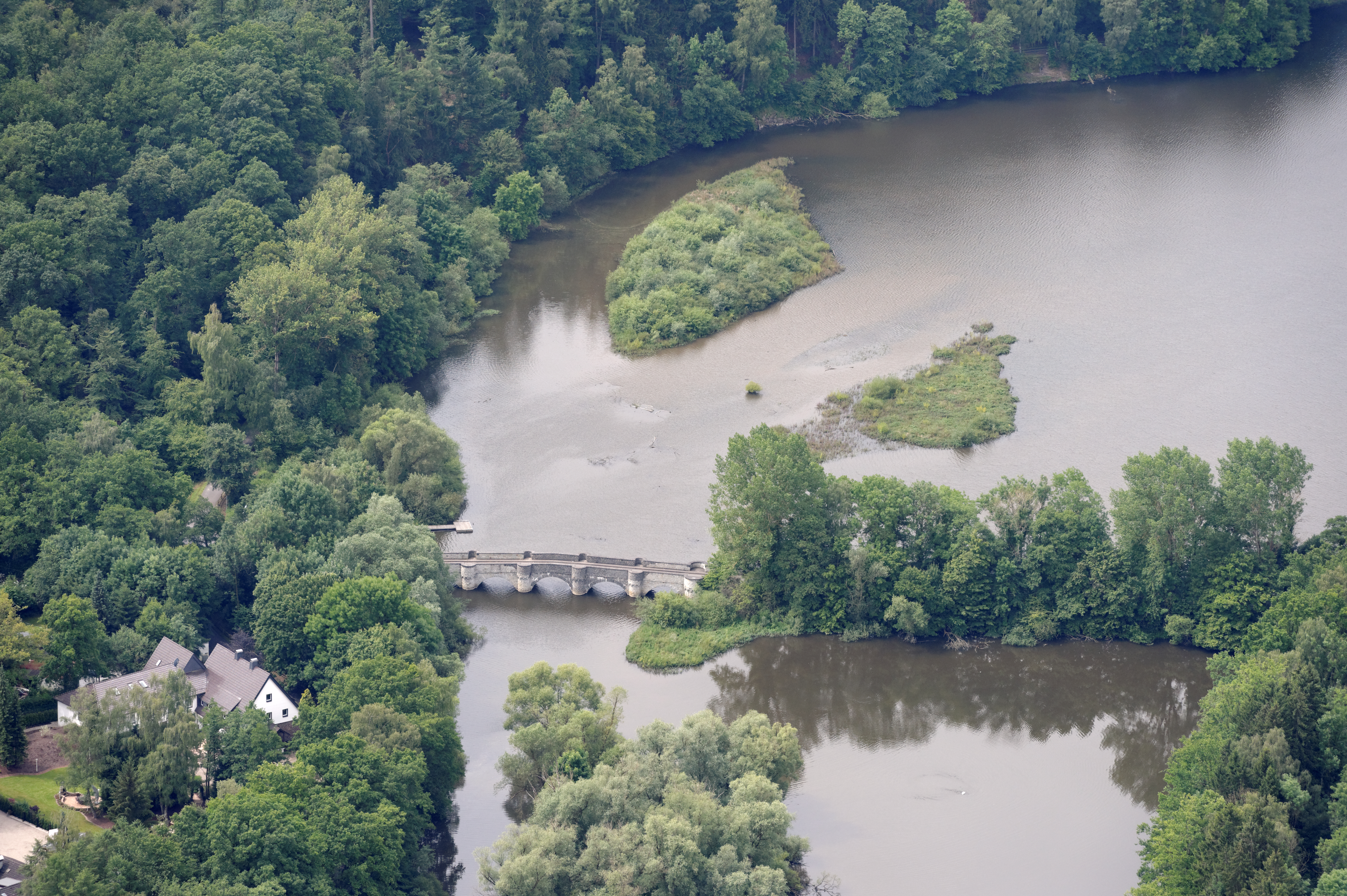 Fotoflug Sauerland-Nord: Kanzelbrücke im Einlaufbereich der Möhne in den Möhnesee; unten im Bild ein Teil des Naturschutzgebiets „Möhnetal“ (NSG SO-015)